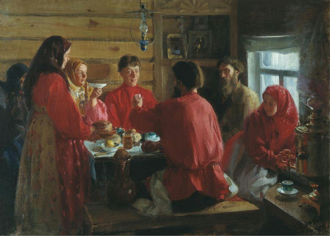 «В крестьянской избе» In a peasant's house